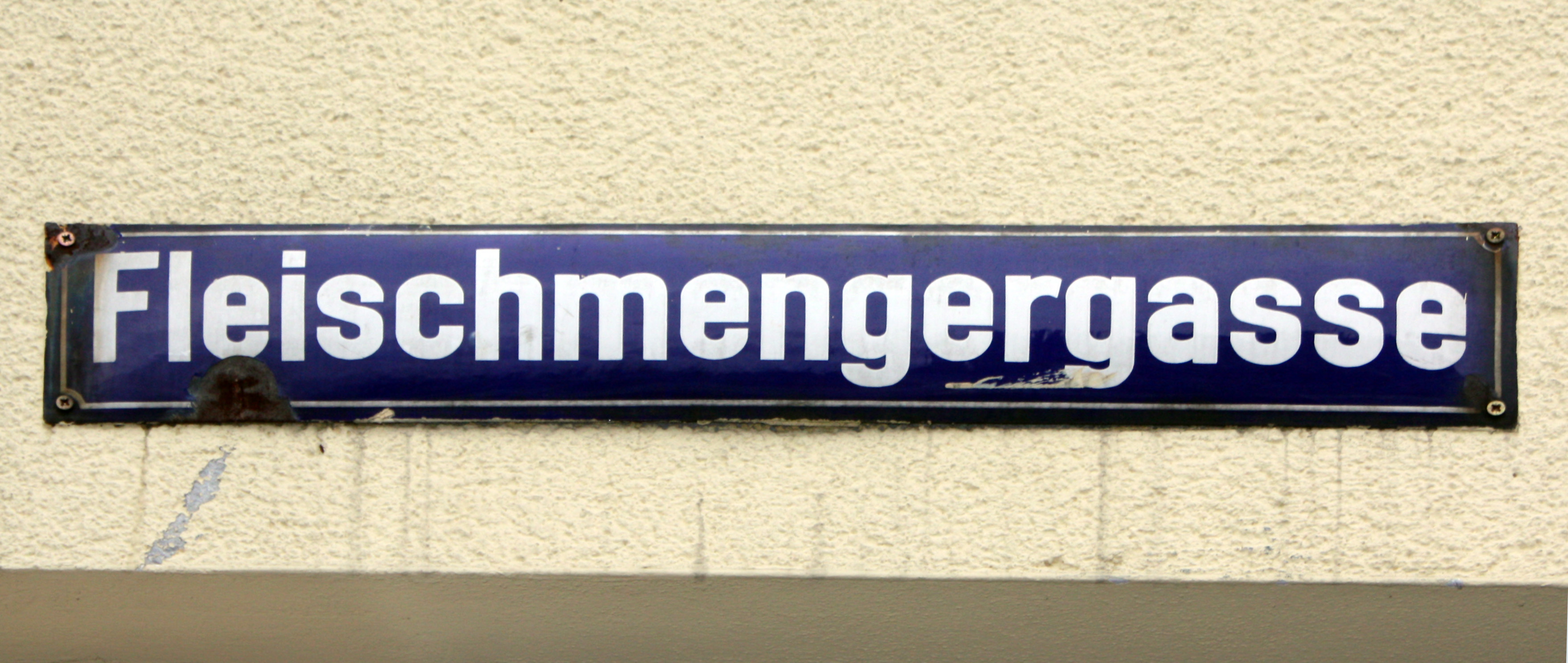 Beschilderung Fleischmengergasse (leicht auf dem Kopf stehend